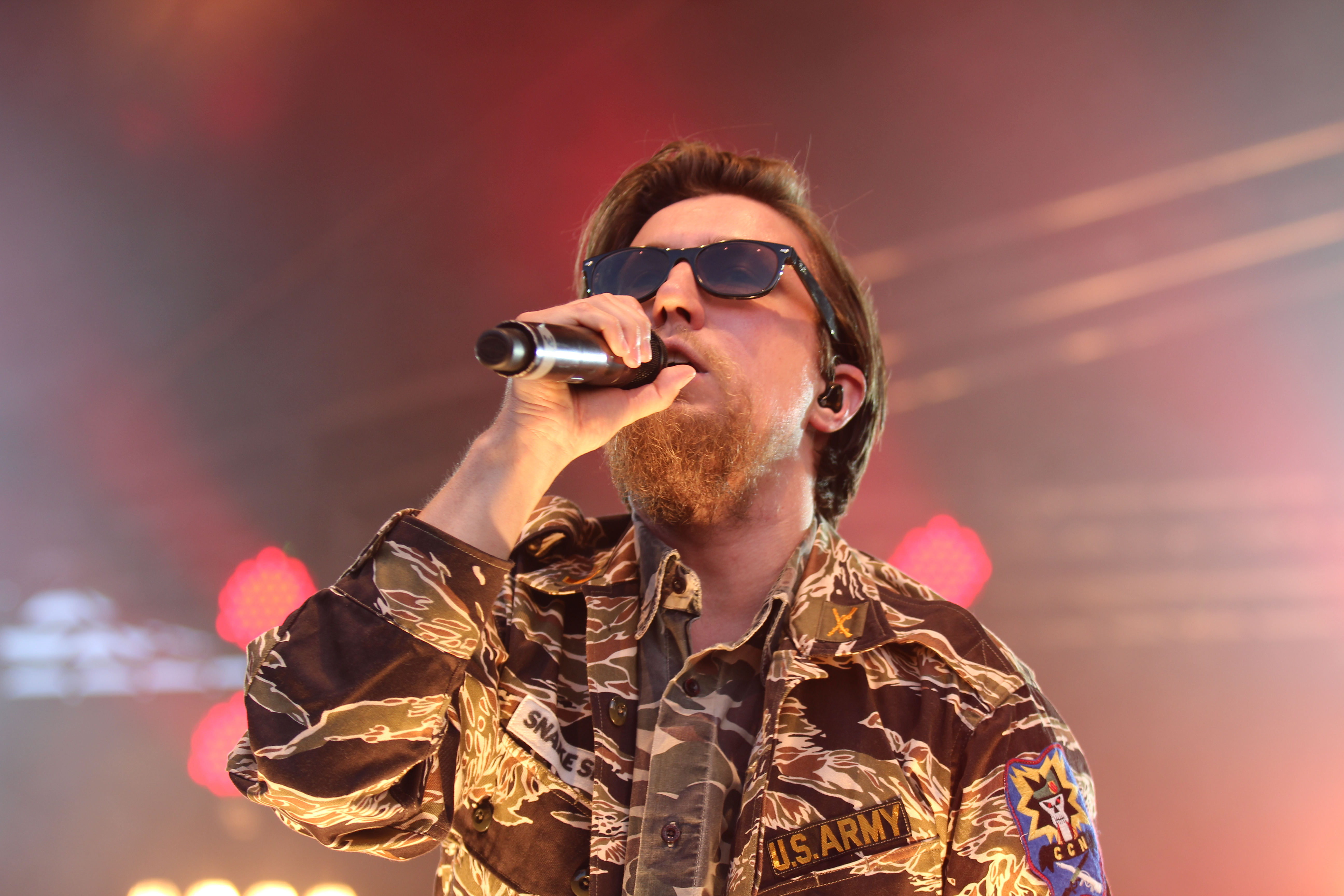 Prinz Pi auf dem gayOben Ohne Open Air Festival 2013 in München